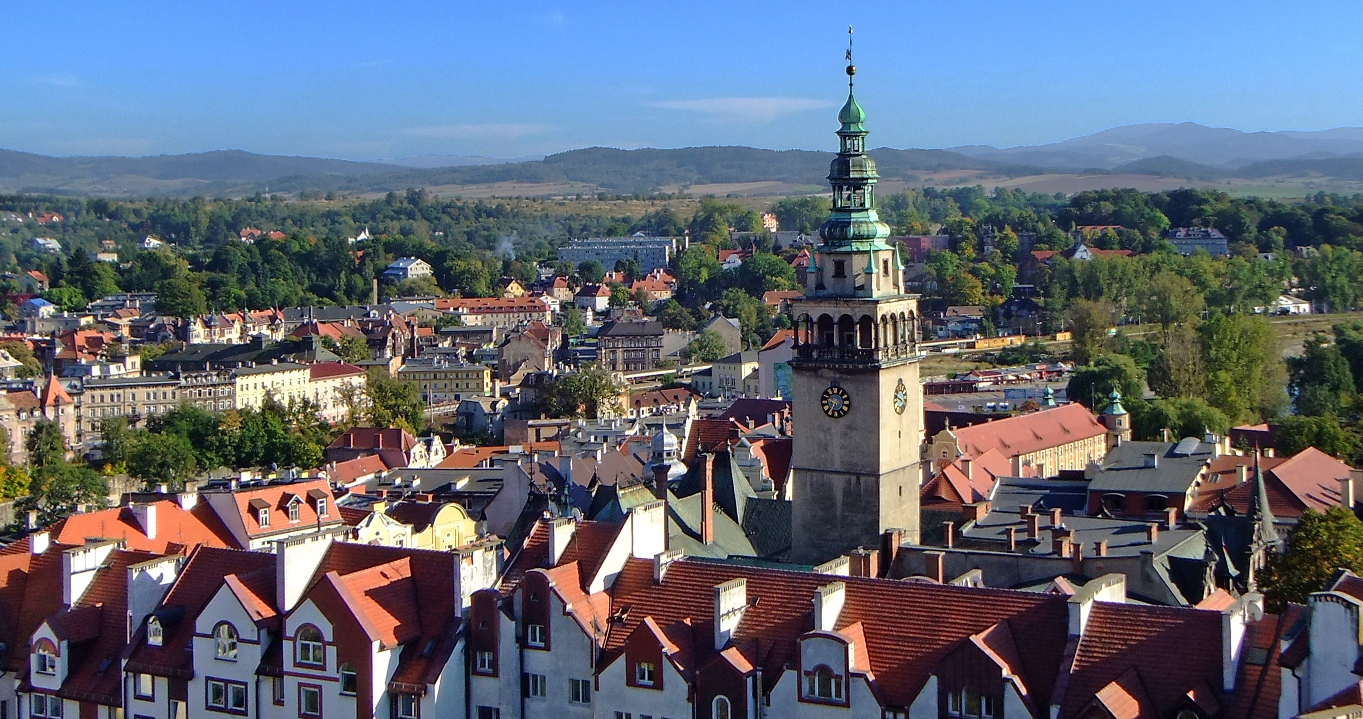 ośrodek historyczny miasta Kłodzko